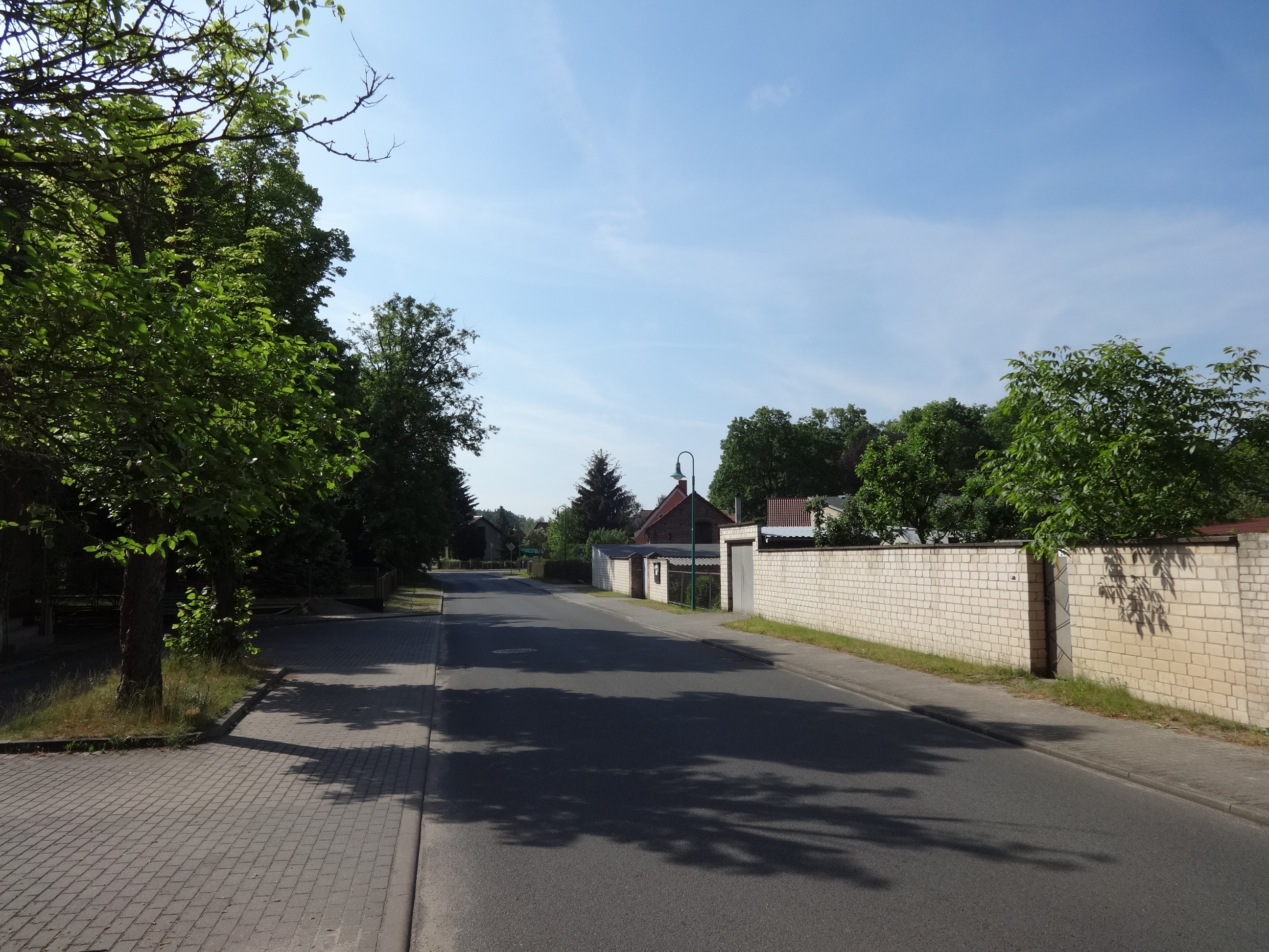 Funkenmühle, ein Gemeindeteil des Ortsteils Lindenbrück der Stadt Zossen in Brandenburg